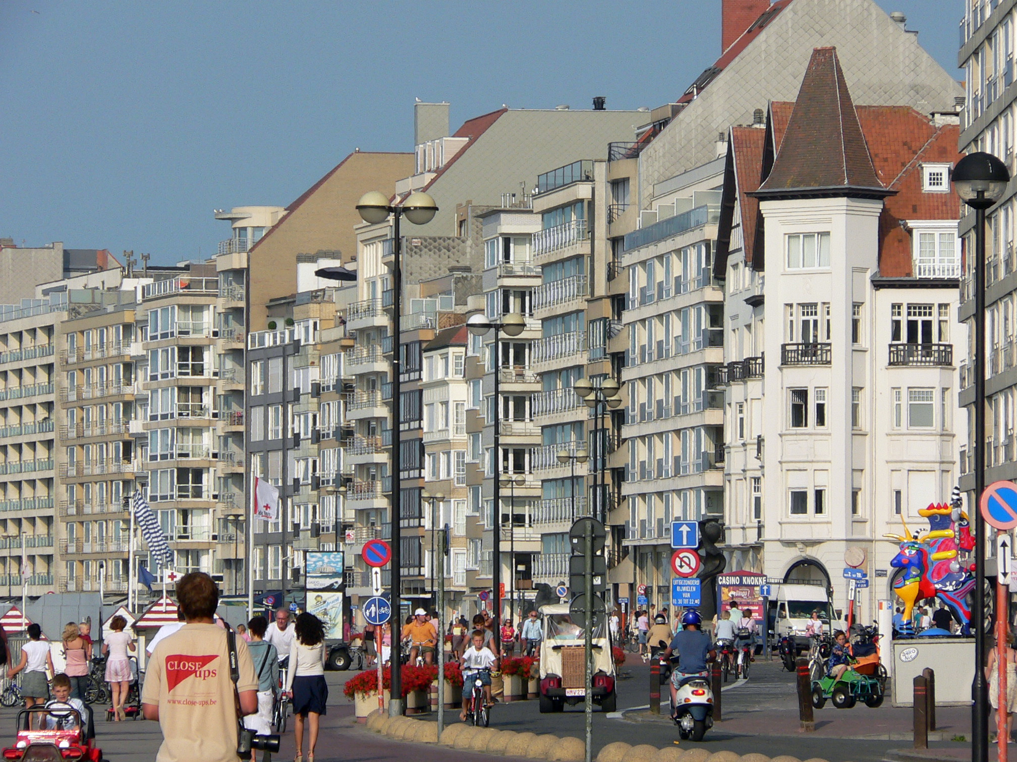 Auteur I Poulsen Promenade du Zoute à Knokke, vue vers le nord. Sculpture de Niki de Saint Phalle visible à droite. A disposition de la fondation WIKIPEDIA Licensing Catégorie:Image sur Wikipédia